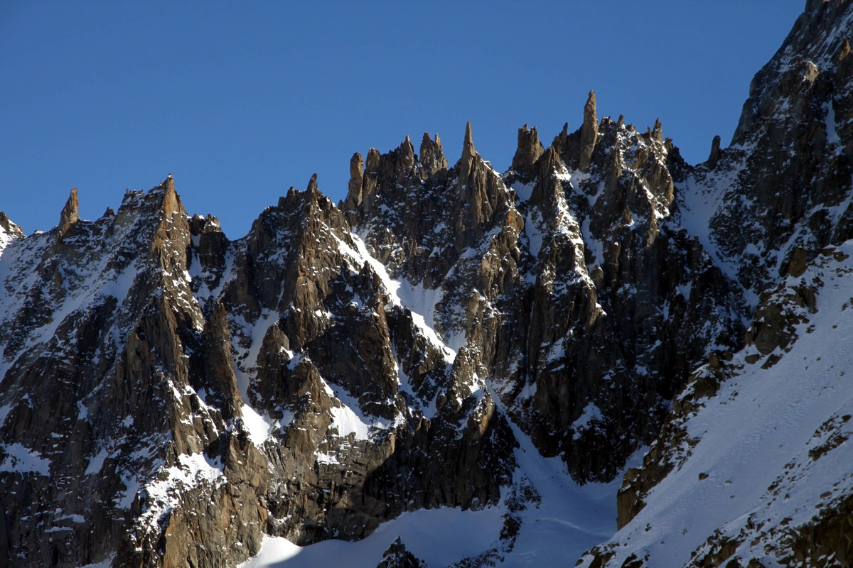 Les Periades viste da sud-ovest